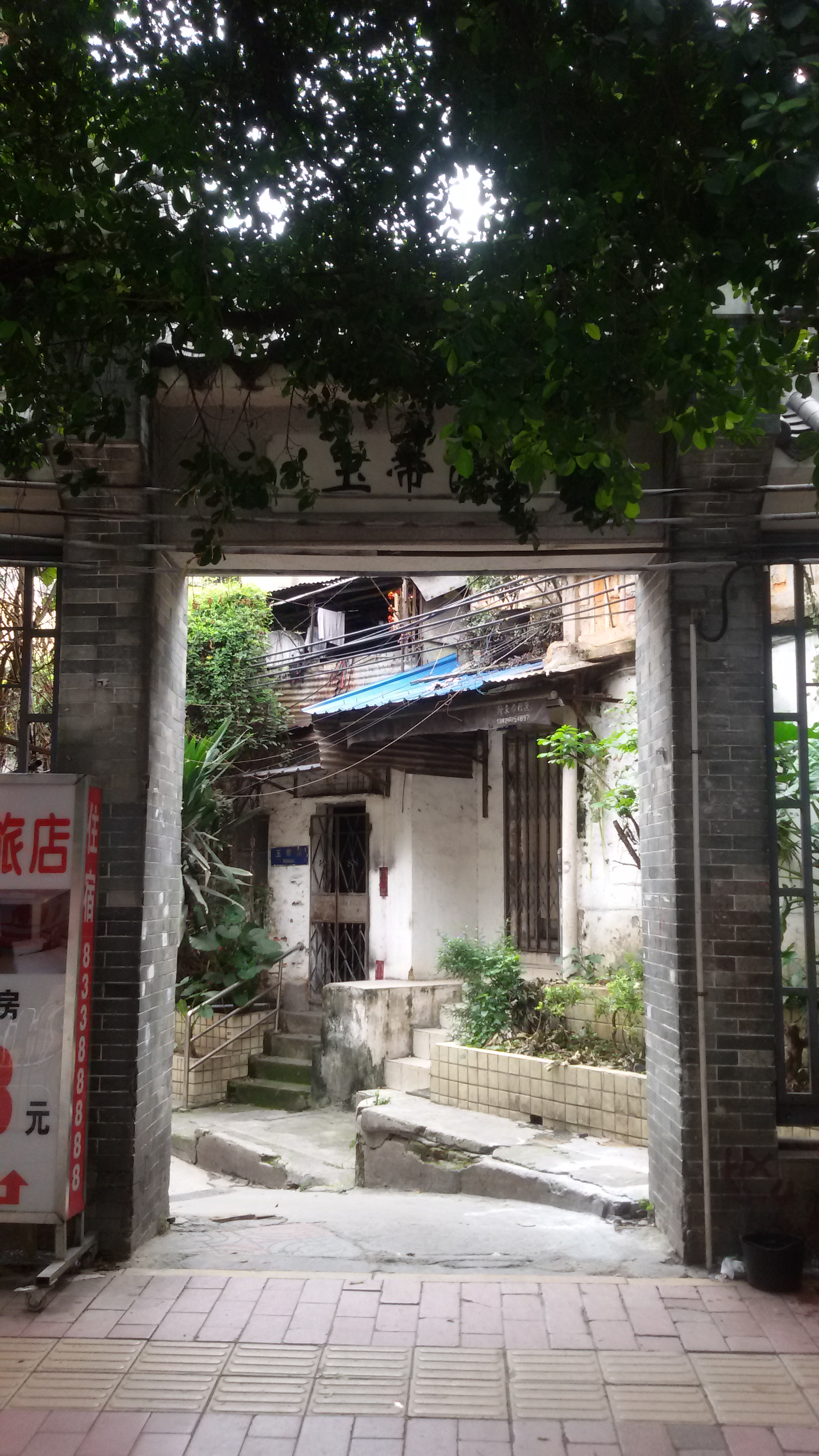 粵語: 玉帶濠